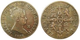 Moneda de vuit morabatins encunyada a Barcelona el 1858, regnant Isabel II. Feta en coure.